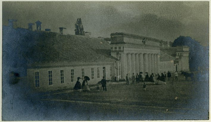 Беларуская (тарашкевіца): Сьвіслач (Śvisłač), пляц Гімназічны (plac Gimnazičny) або Рынак (plac Rynak). Сьвіслацкая гімназія